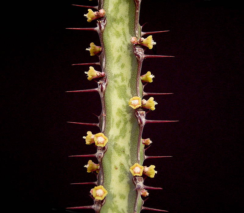 Euphorbia complexa